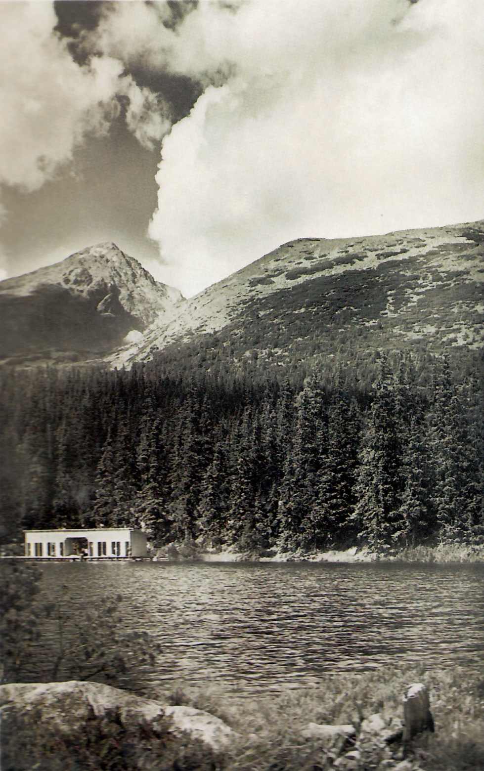 Majiteľ Nedobrého chaty pri Jamskom plese vo Vysokých Tatrách - Gustáv Nedobrý postavil na brehu plesa plaváreň. Snímka je z roku 1937.